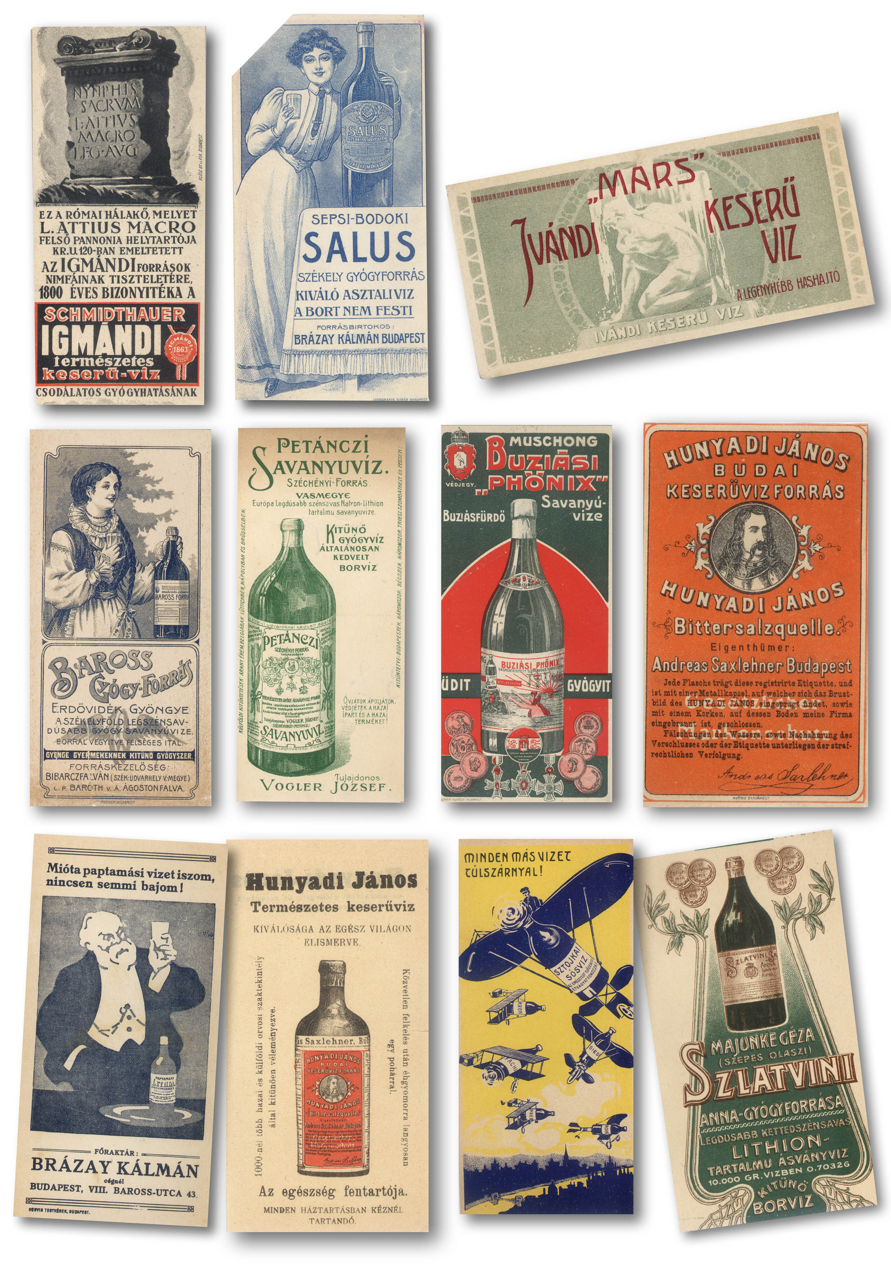 Palackozott hazai gyógyvizek reklámjai 1920 előttről.